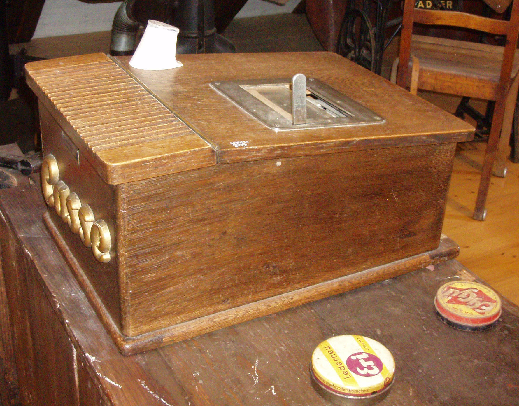 Kasse in der Schusterwerkstatt im Museum unter der Y-Burg